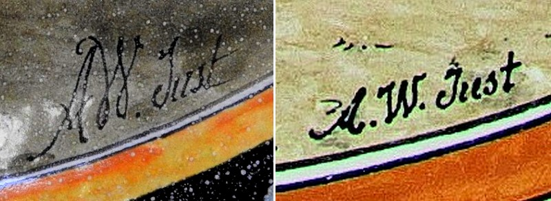 signatures le plus couramment utilisées dans le motif par A.W. Just